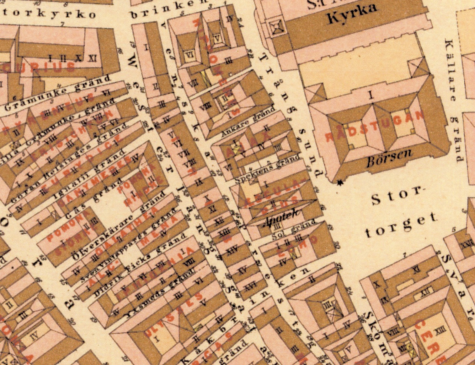 Gamla stan: kvarteren Iris, Hippomenes, Ajax, Æseulapius, Aesculapius, Echo, Rådstugan m.fl.